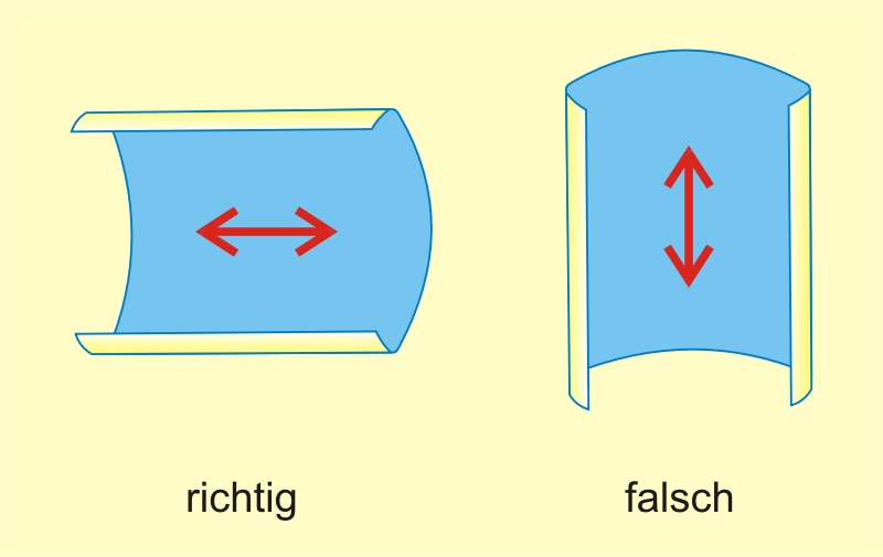 Faserlaufrichtung bei Papieretiketten